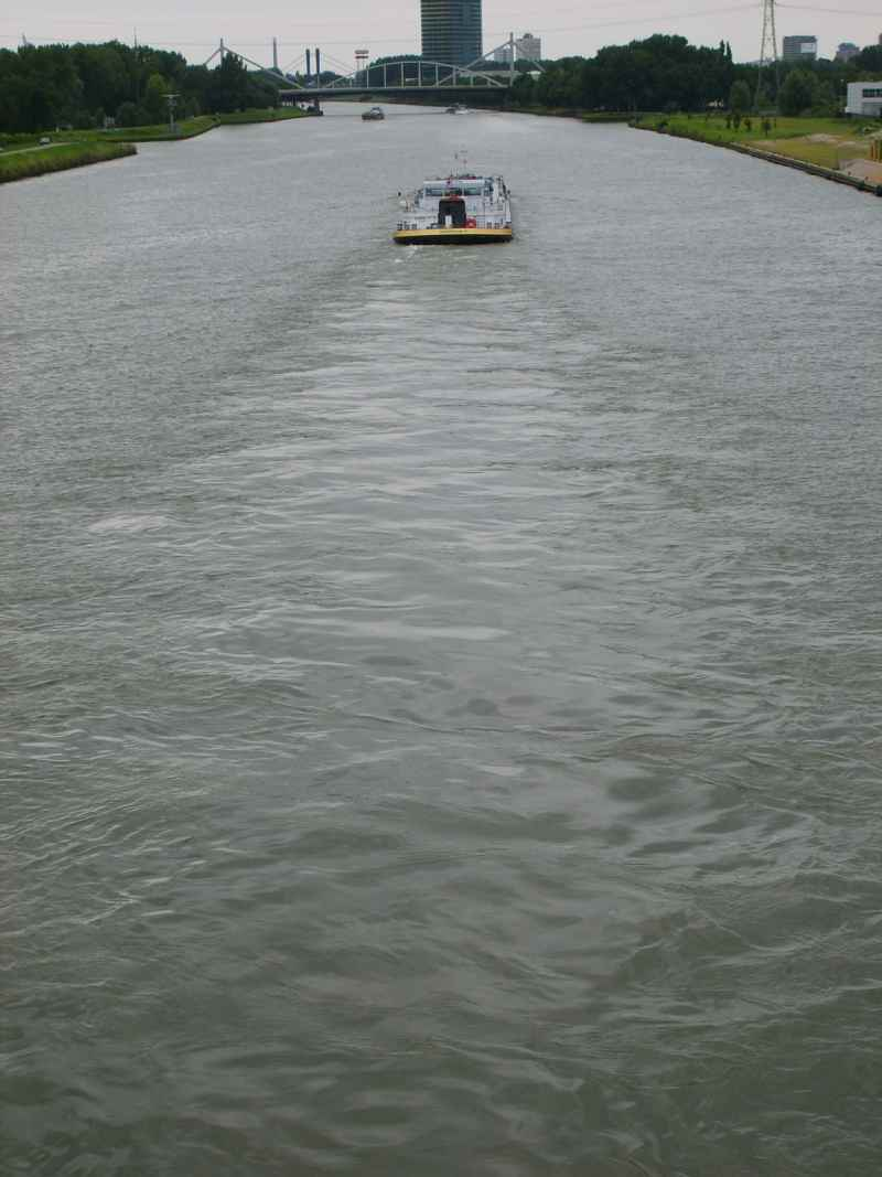 foto kielzog